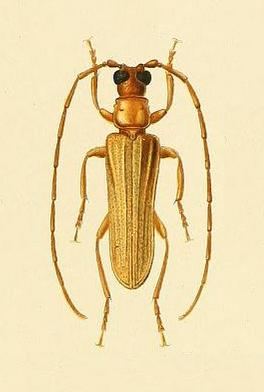 Doesus telephoroides (Pascoe, 1862)